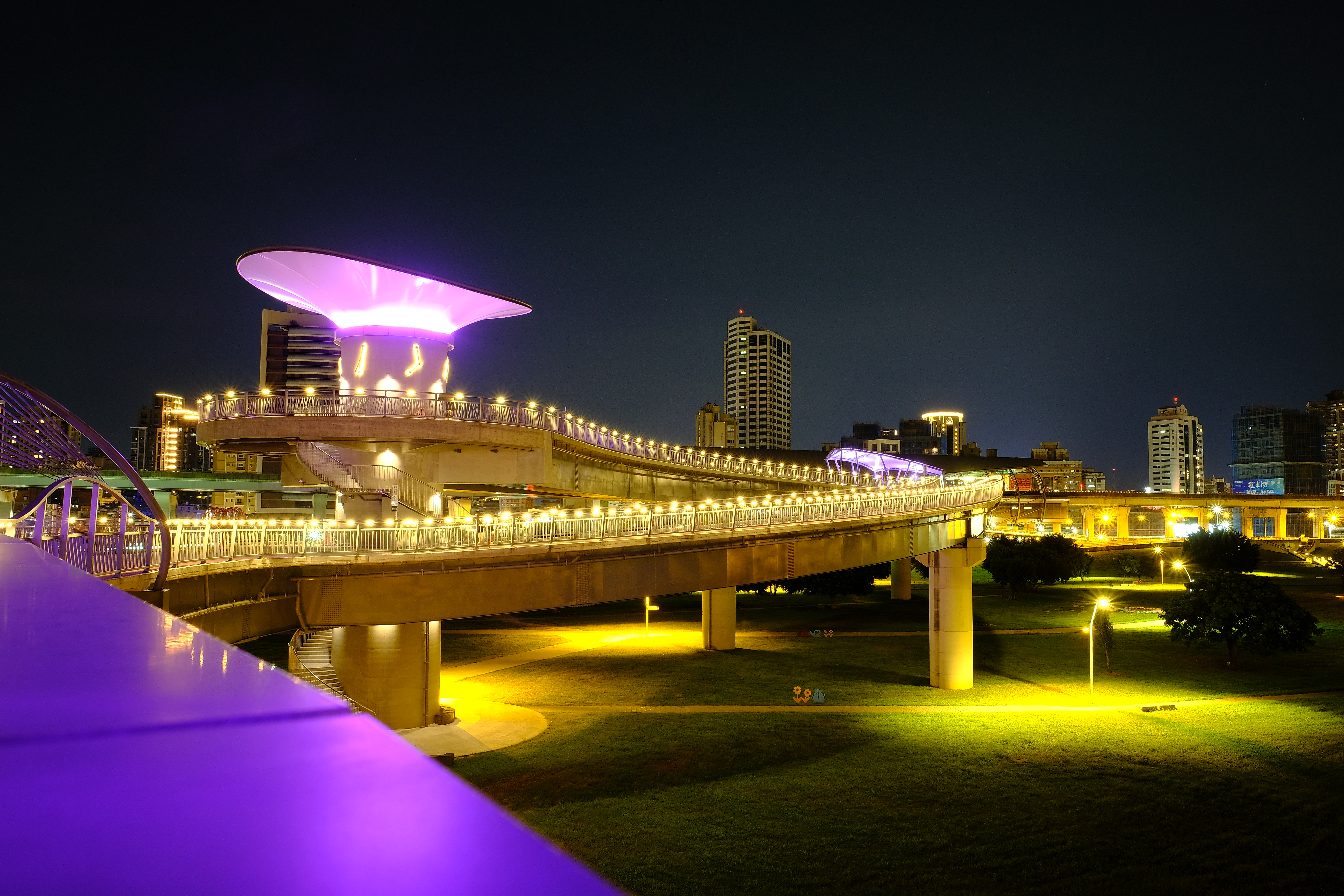 中文（台灣）: 2020 Chen Guang Bridge(New_Taipei) juillet新北大都會公園辰光橋